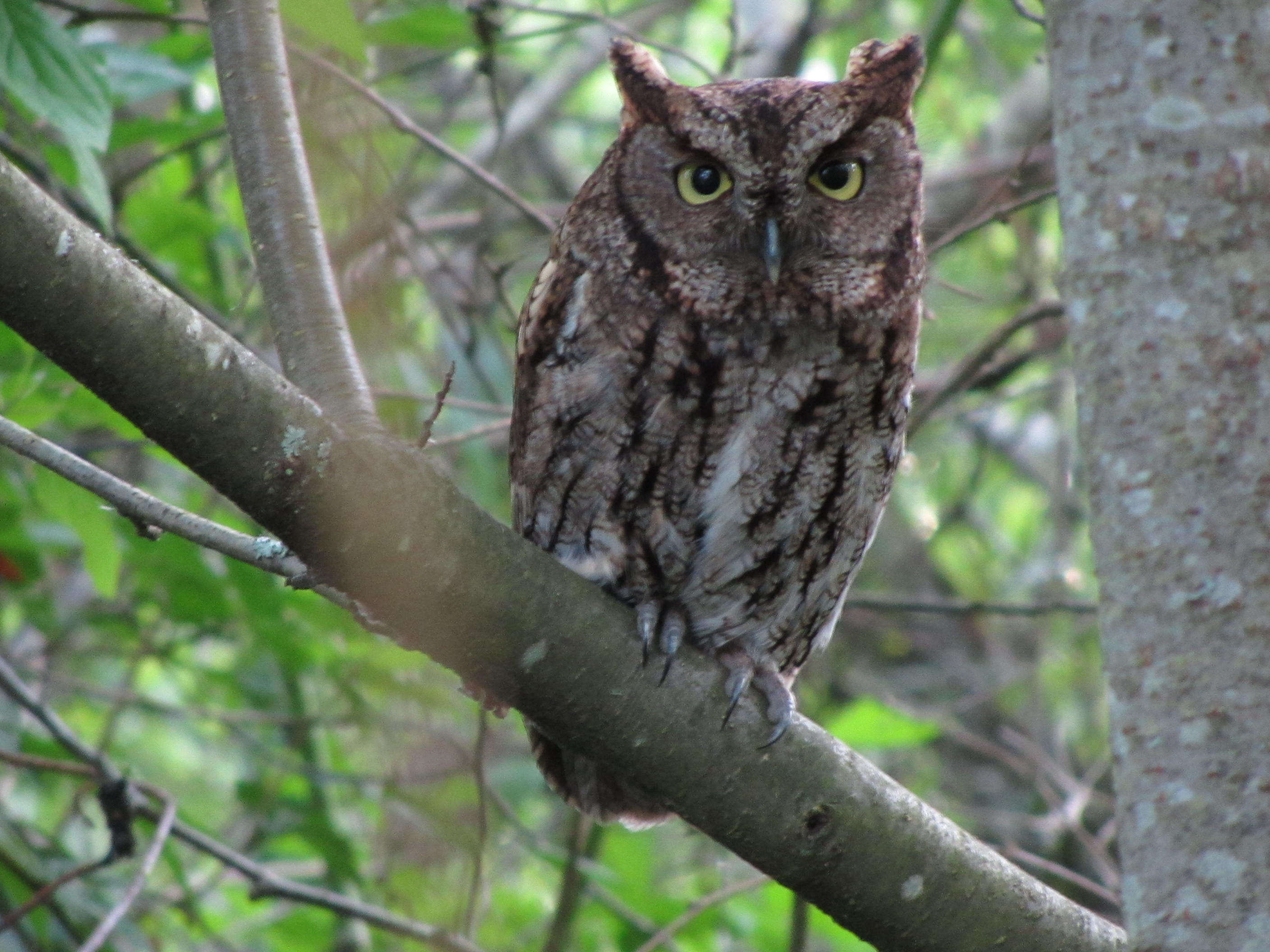 6-23-12 Owl -- Juanita Bay Park, Kirkland, WA